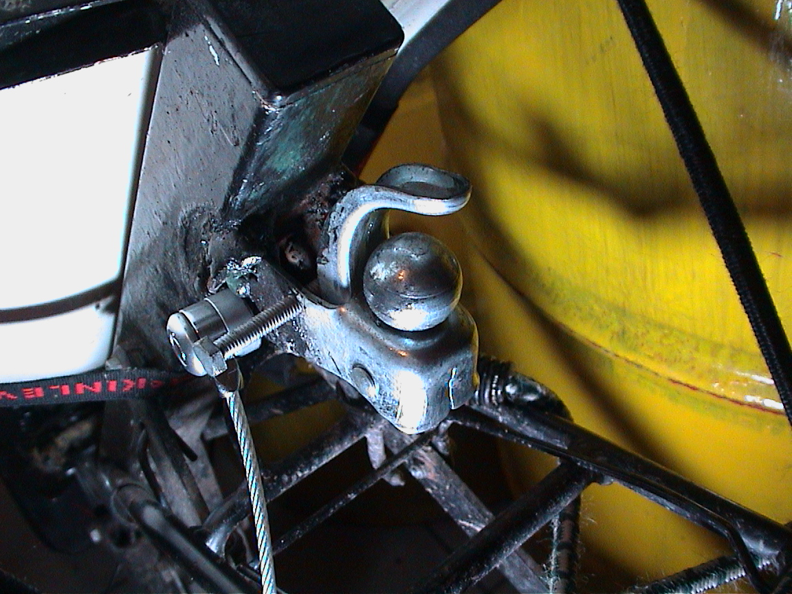 Ein Fahrrad, das mittels eines Kensington Lock gesichert ist.